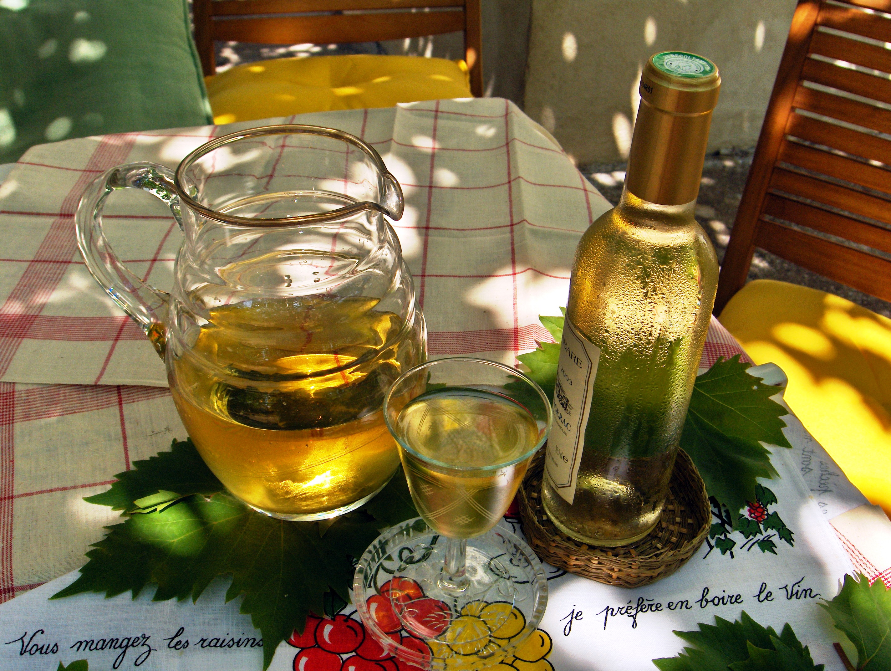 Le Petit vin blanc de Nogent - White light wine of Nogent